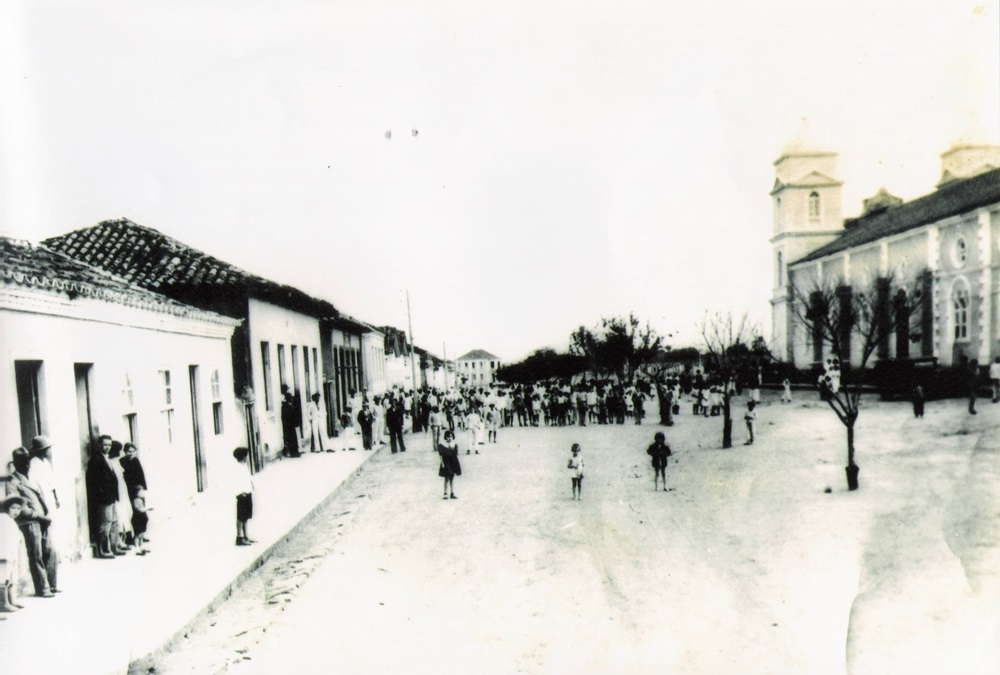 Conceição da Boa Vista Antigo distrito de Cabo Verde, atualmente Divisa Nova